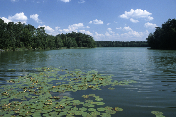 Jezioro Rzepsko koło Rzepina, 07.2004. Autor: M. Smoczyk.